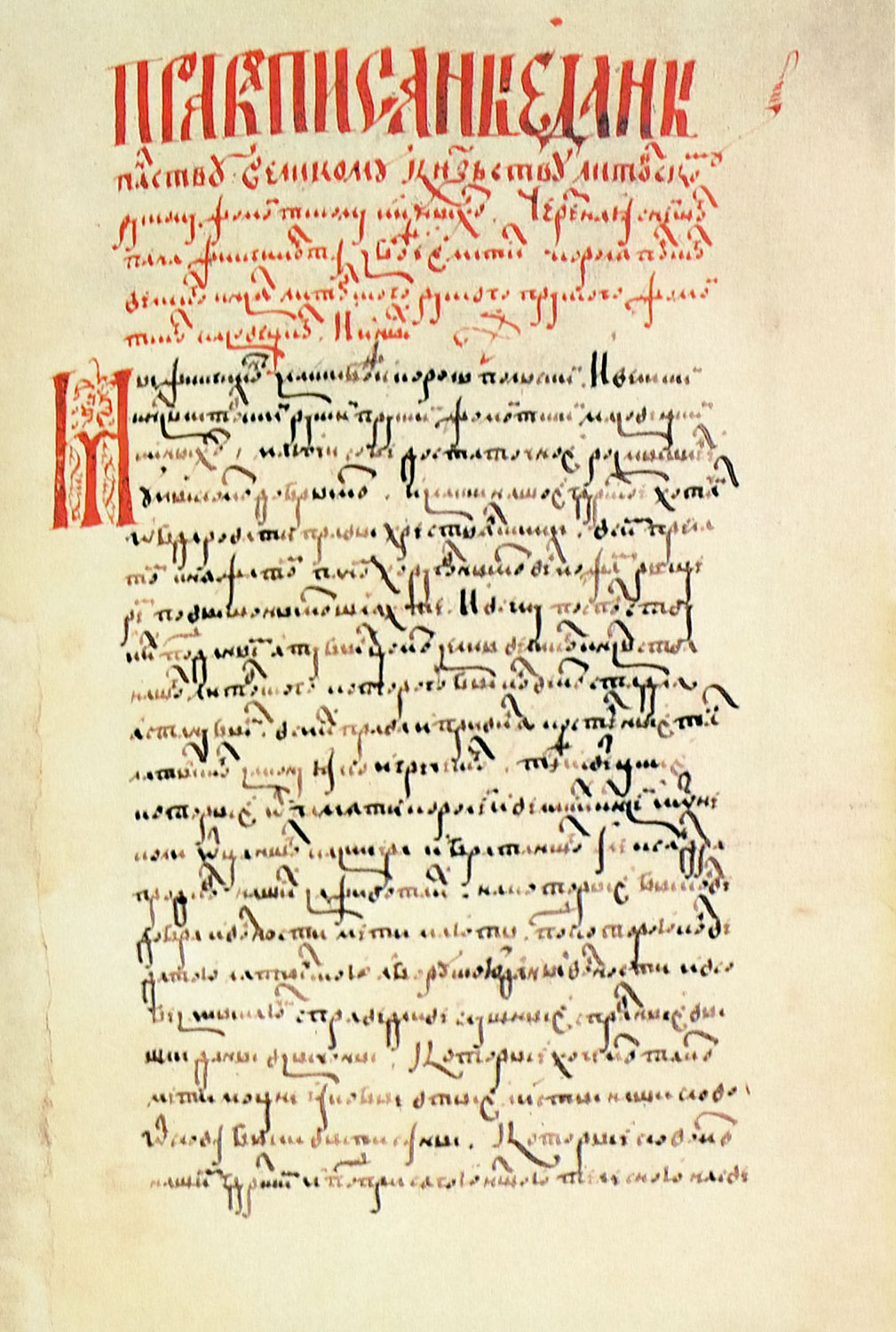 Беларуская (тарашкевіца): Тытульны аркуш Першага Статуту Вялікага Княства Літоўскага.